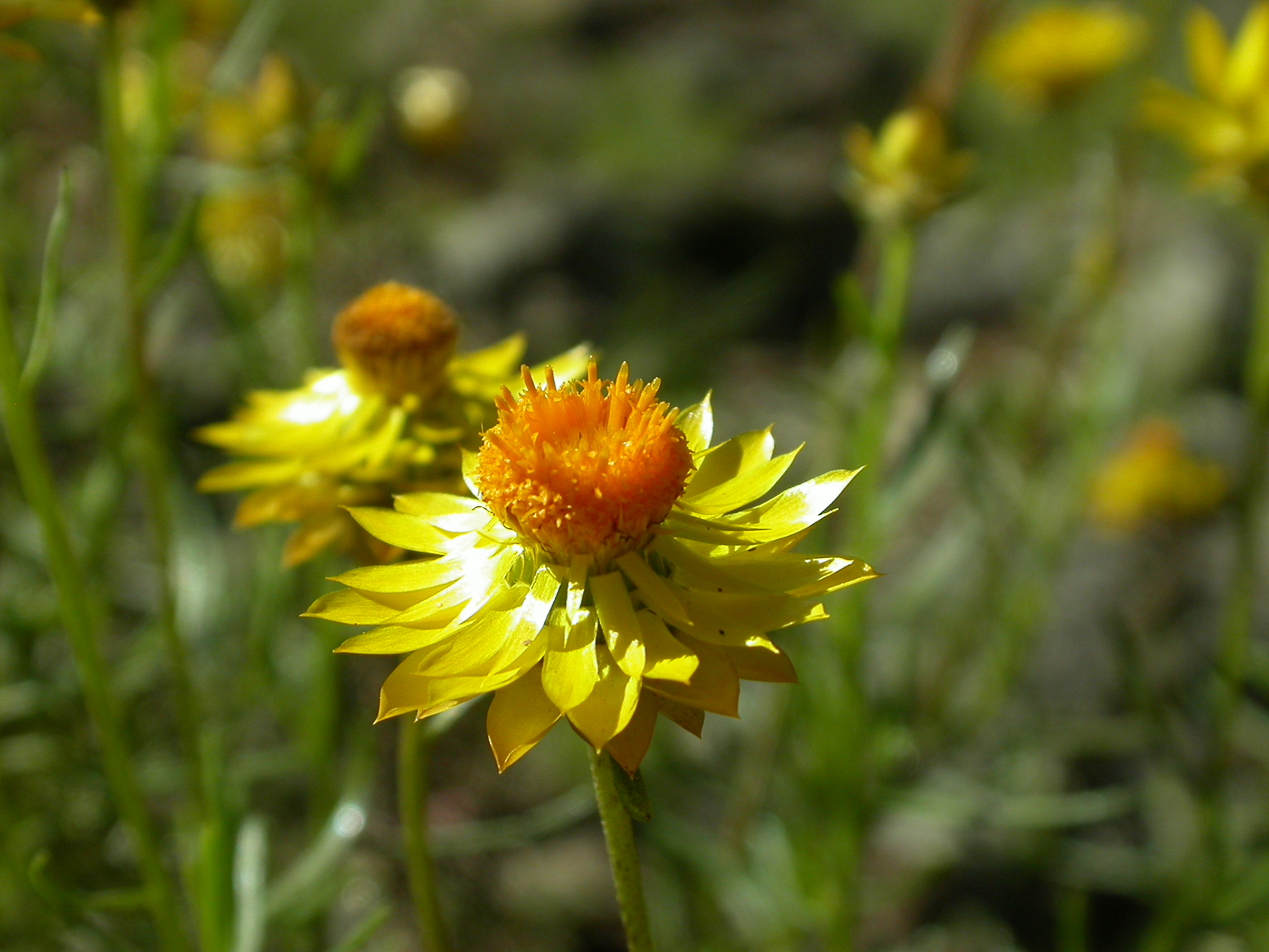 Xerochrysum viscosum (DC.) R.J.Bayer, Mt. Ainslie, Canberra, ACT, 28 December 2007